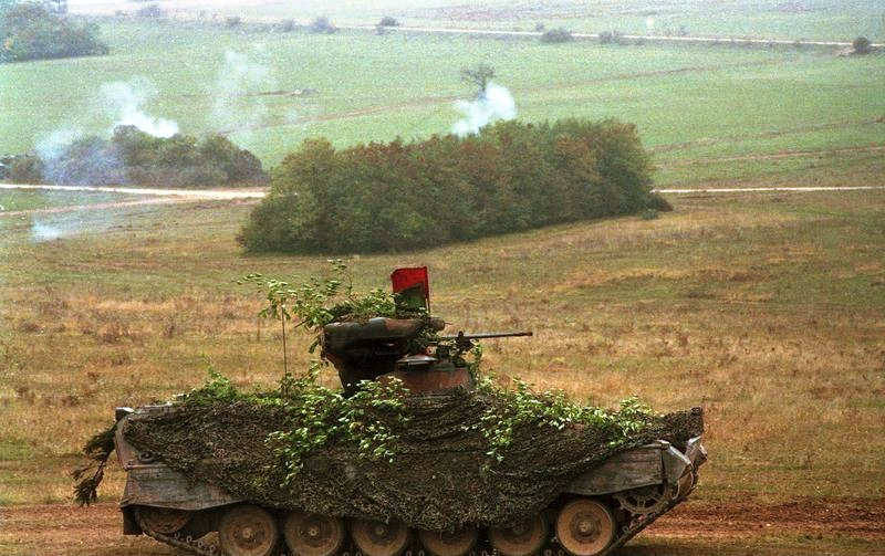 23.9.1986 Mitarbeiter des Bundespresseamtes beobachten das Herbstmanöver "Fränkischer Schild" der Bundeswehr- mit Beteiligung zahlreicher Soldaten aus NATO-Mitgliedsstaaten sowie eines französichen Großverbandes - im Raum Würzburg.